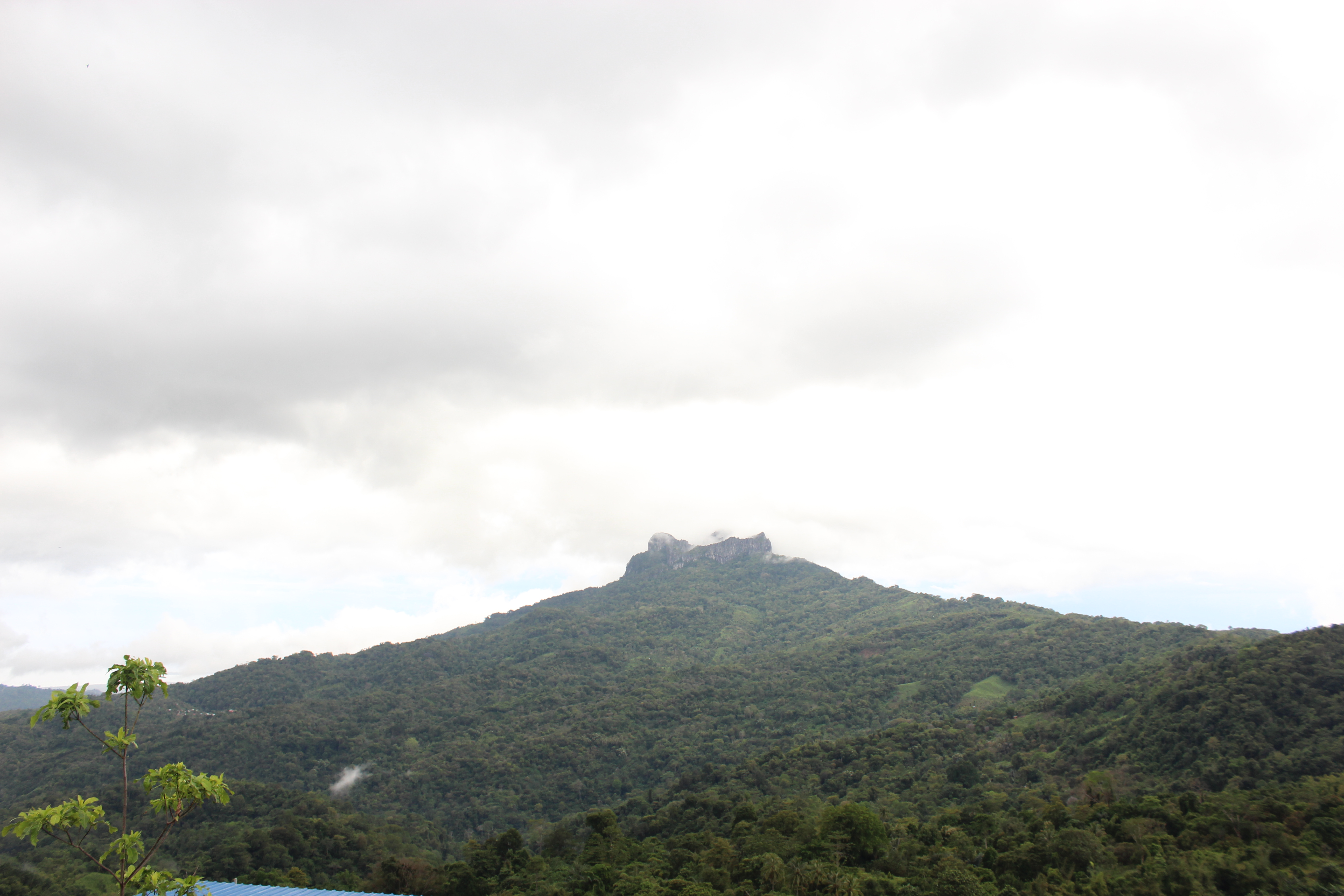 kabaena, gunung watu sangia